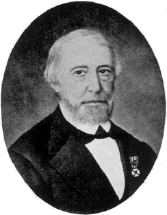 19e eeuwse tekening van C.B. van der Tak, directeur Gemeentewerken Rotterdam